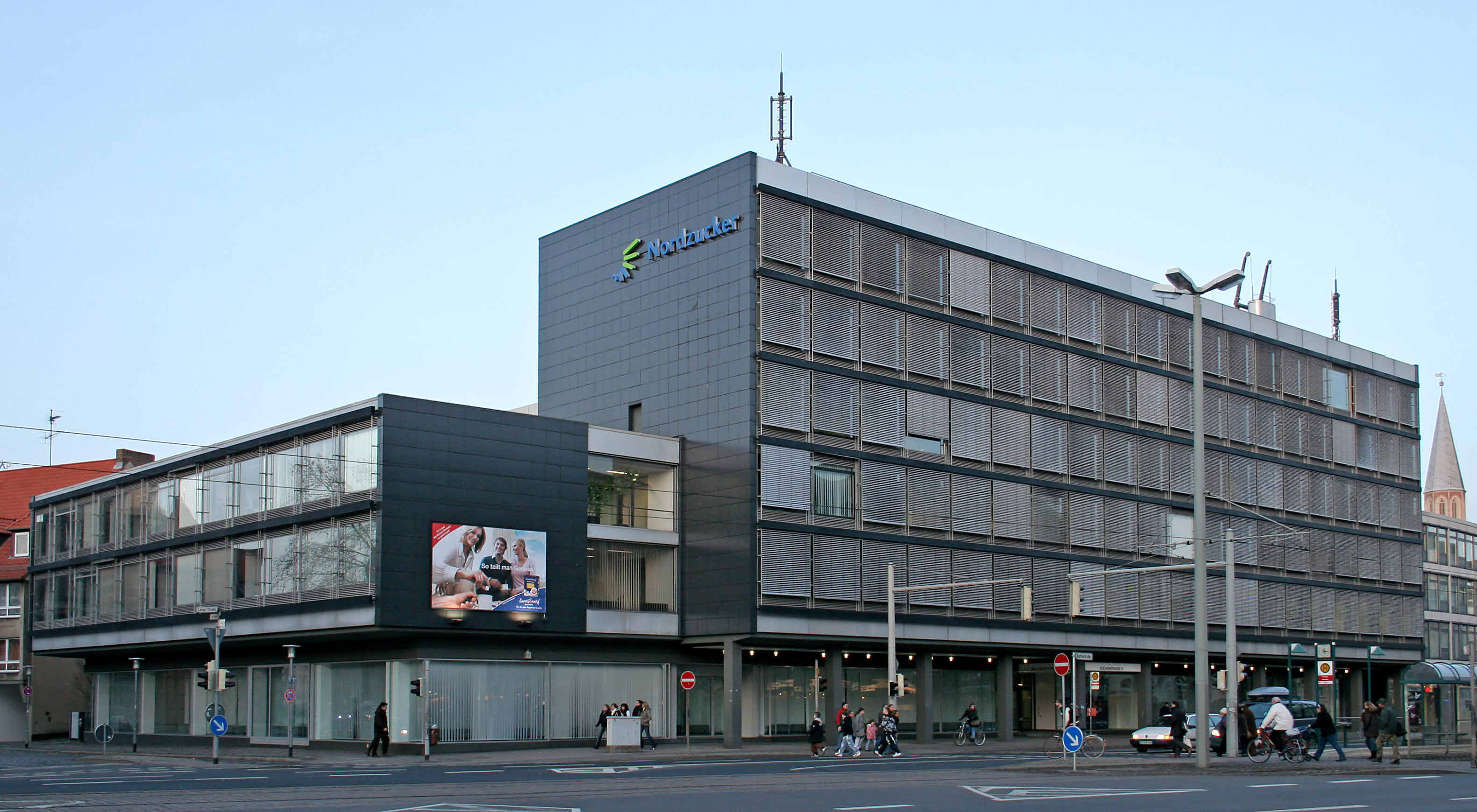 Braunschweig: Zentrale der Nordzucker AG